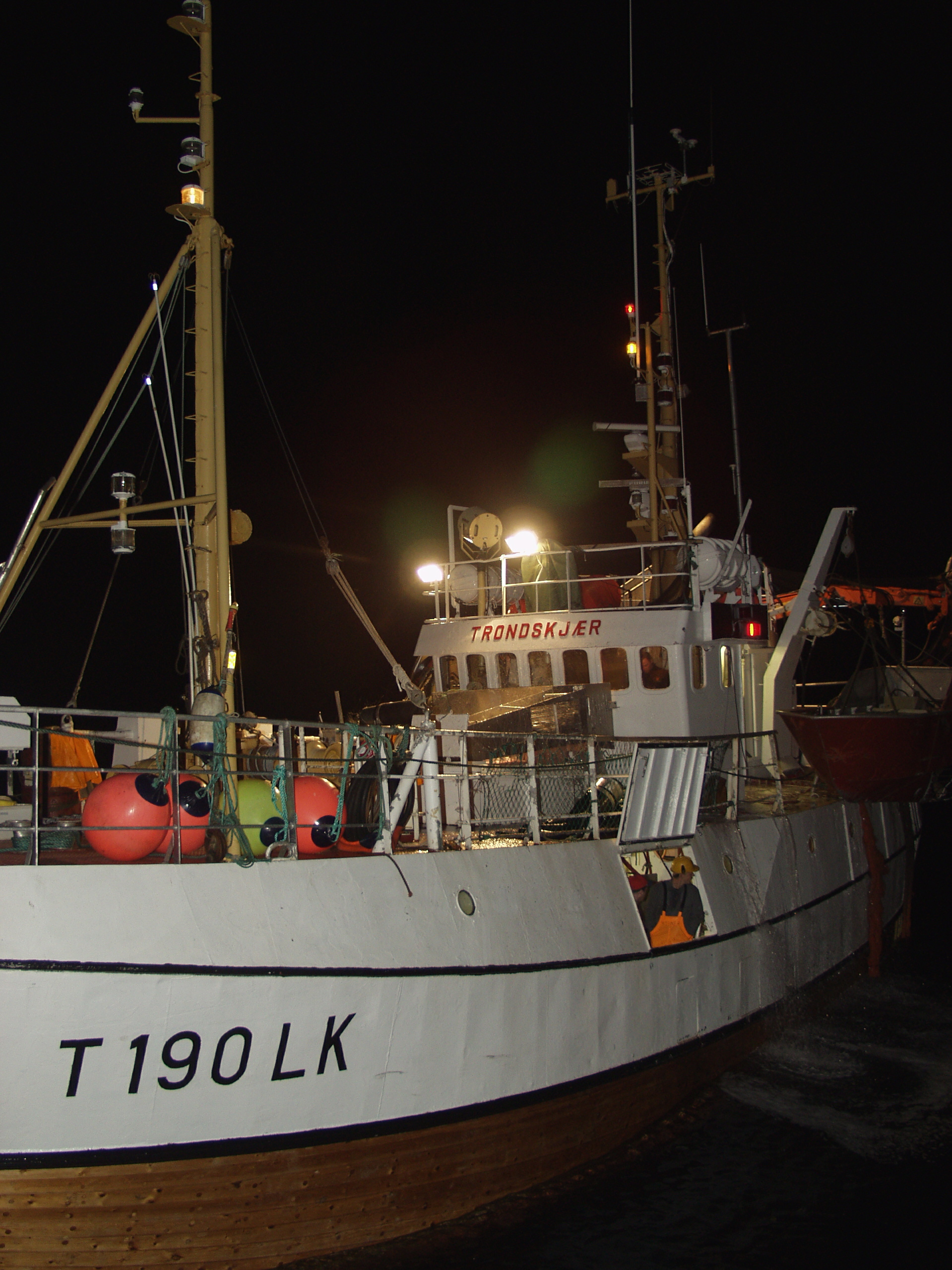 Kystsnurperen "Trondskjær" drar sild på Vestfjorden.